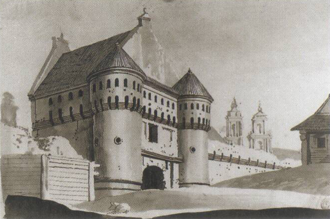 Subačius gate, Vilnius, Lithuania